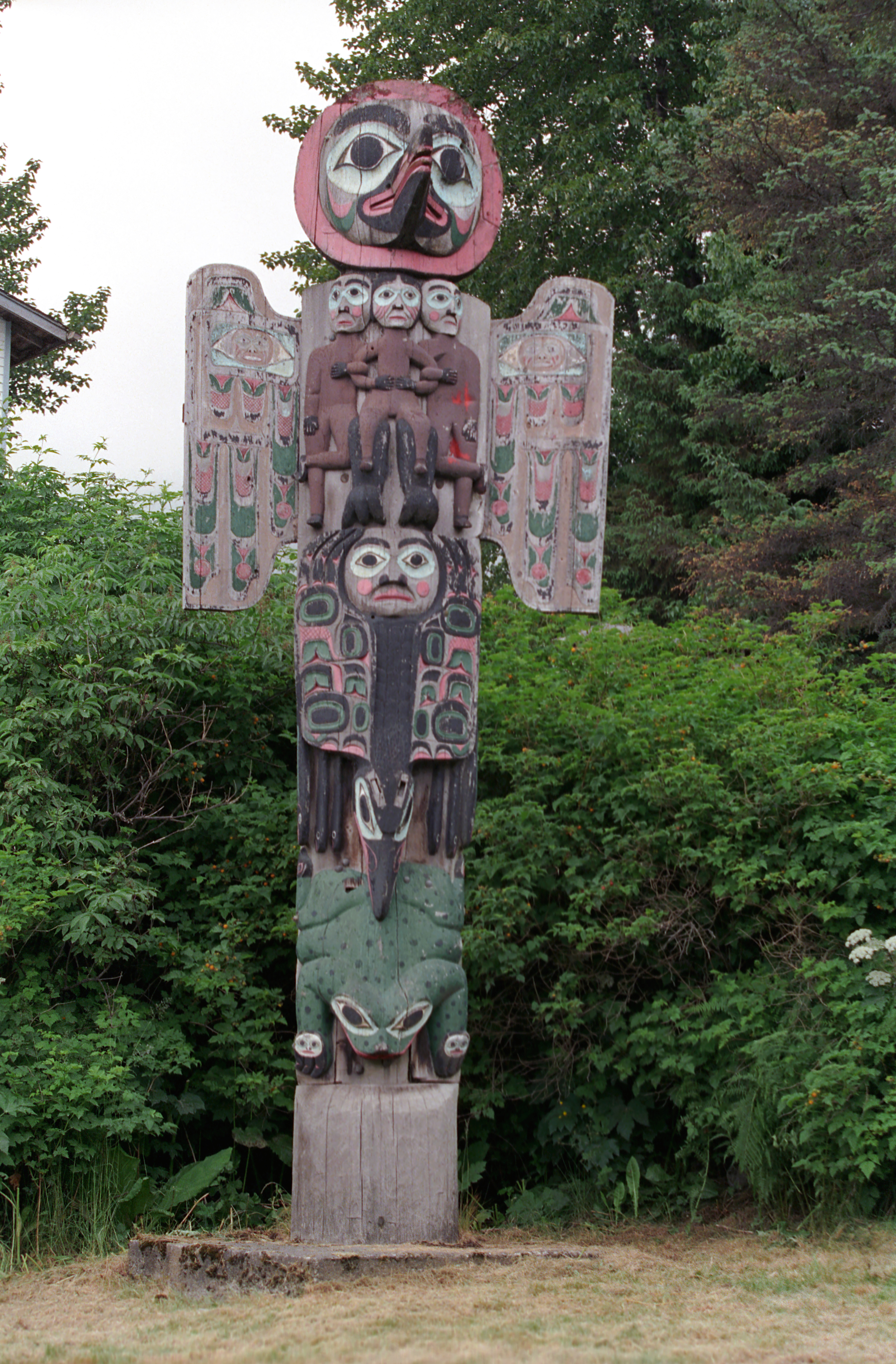 Totem pole, Saxman Totem Park